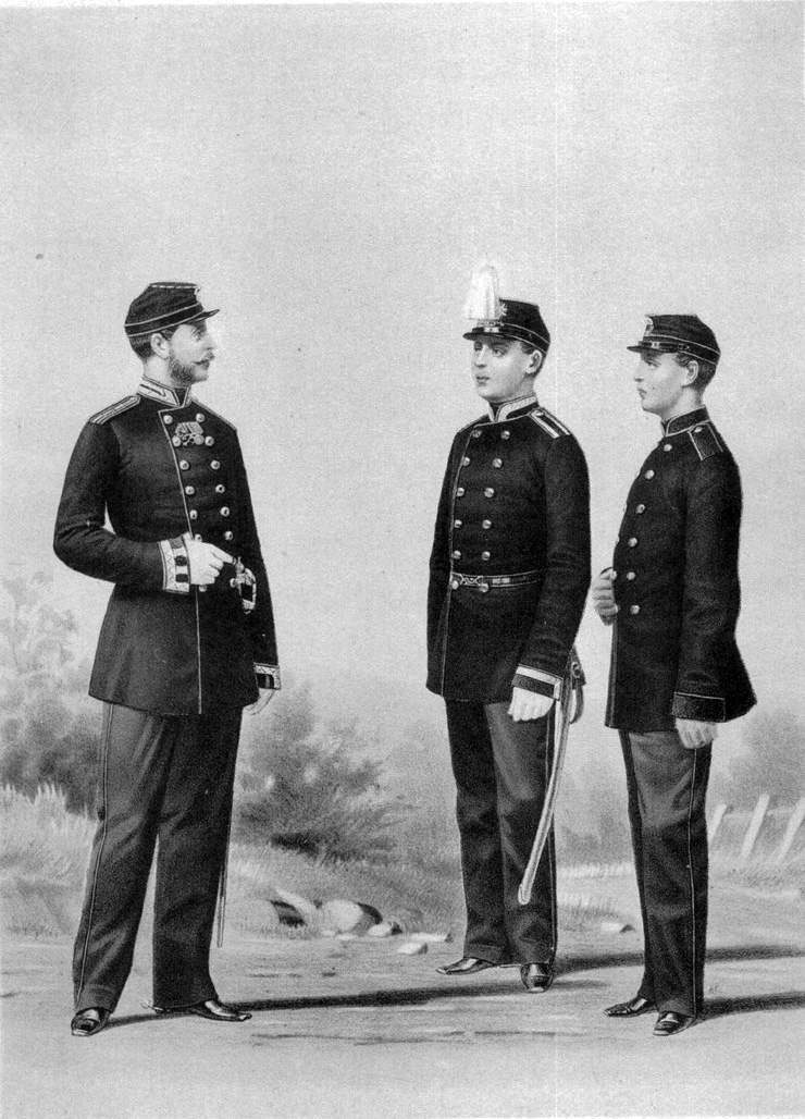 Военные топографы Классный, Унтер-Офицерского звания и Ученик 14 апреля 1867. (Парадная форма).